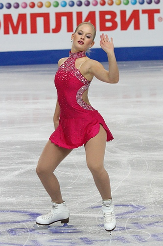 Каат ван Даэле (Бельгия) на чемпионате Европы 2012 года.